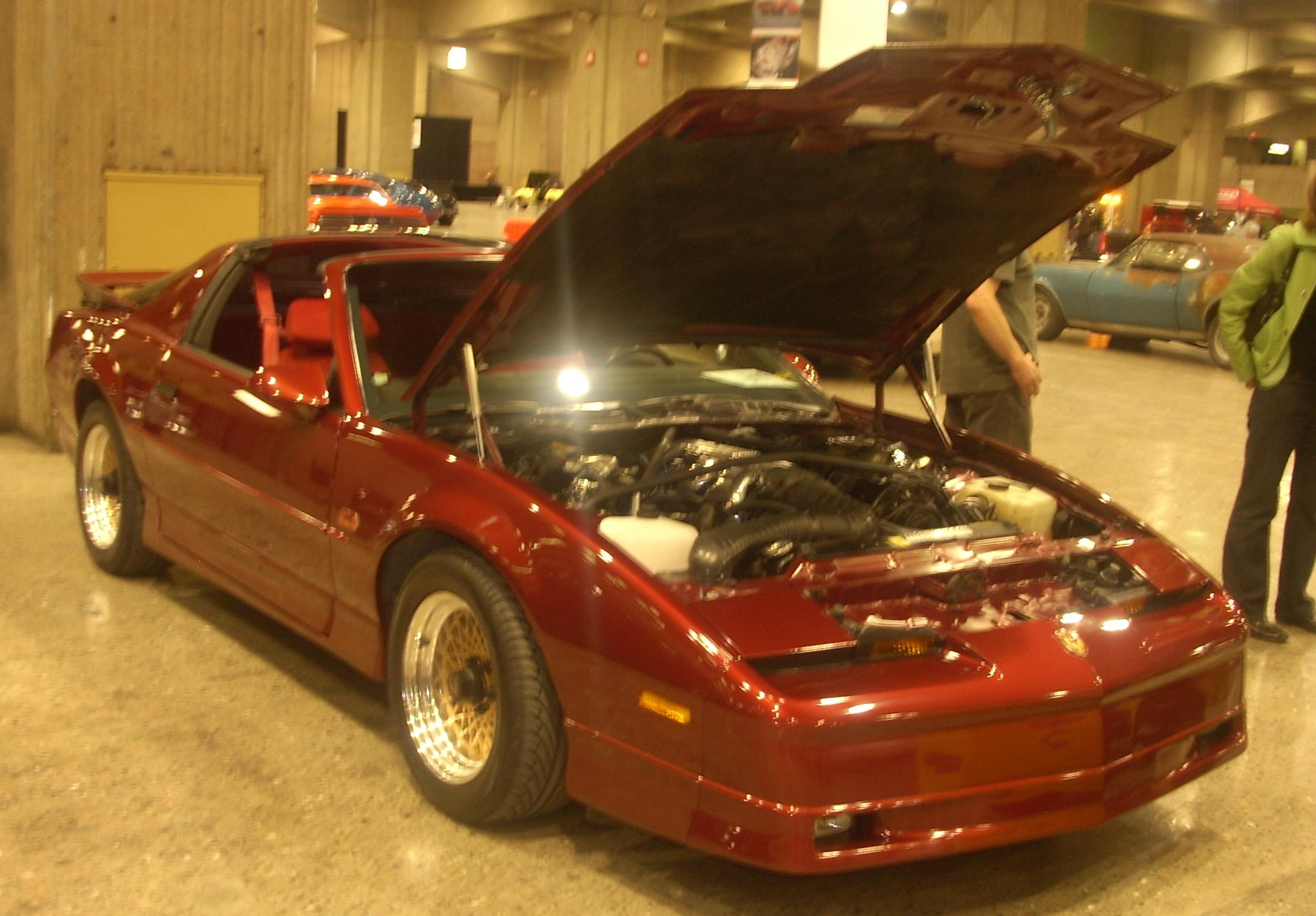 1987 Pontiac Trans Am GTA photographed at Auto classique Montréal 2008.